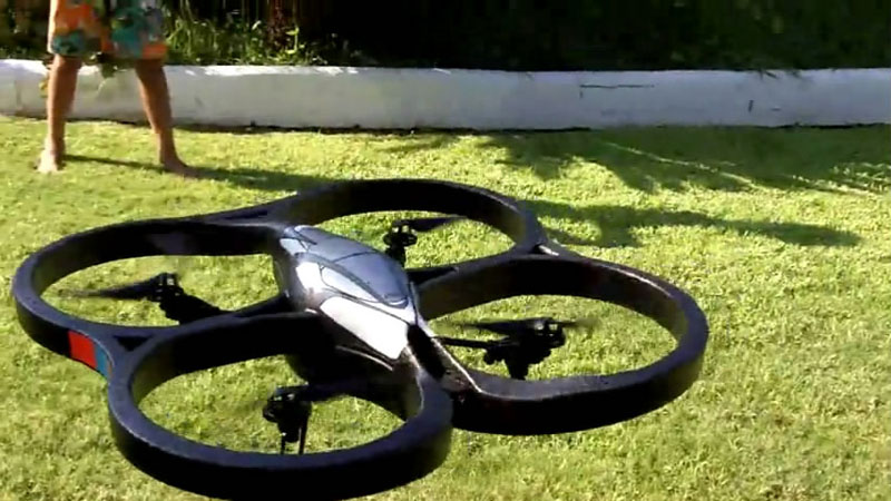 Fotografía tomada con celular de un Parrot AR.Drone sobrevolando el jardín